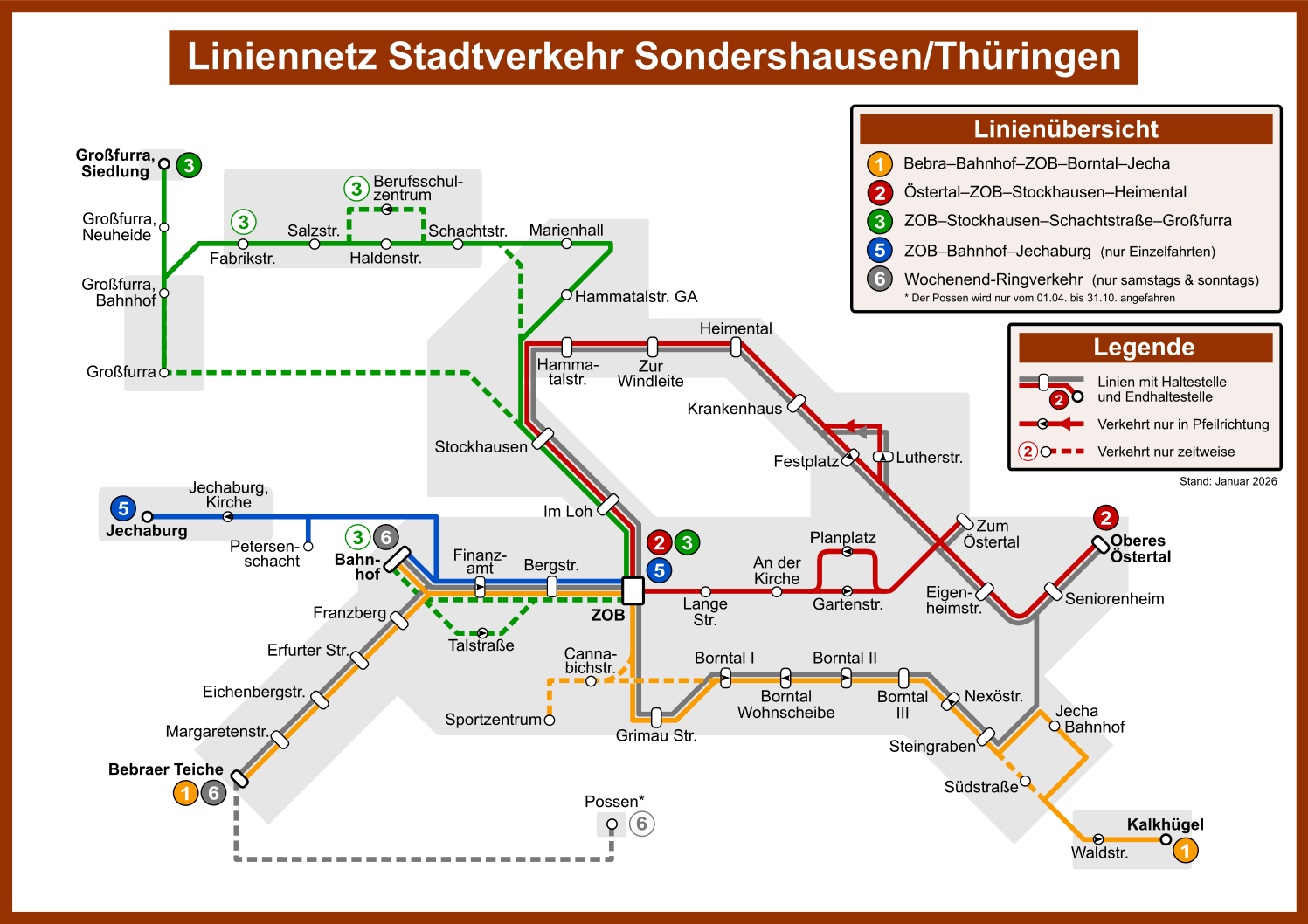 Liniennetzplan Stadtbusverkehr Sondershausen (eigenes Werk).